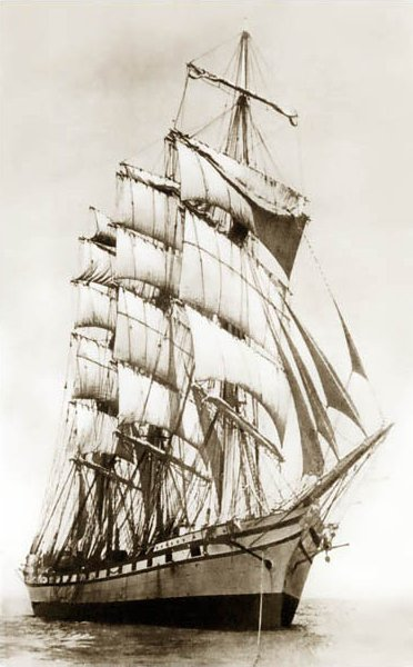 Persévérance, quatre-mâts de l'Armement Bordes, construit par Mediterranee, à La Seyne, France (pas à confondre avec Persévérance (1886-1891), aussi utilisé par Bordes